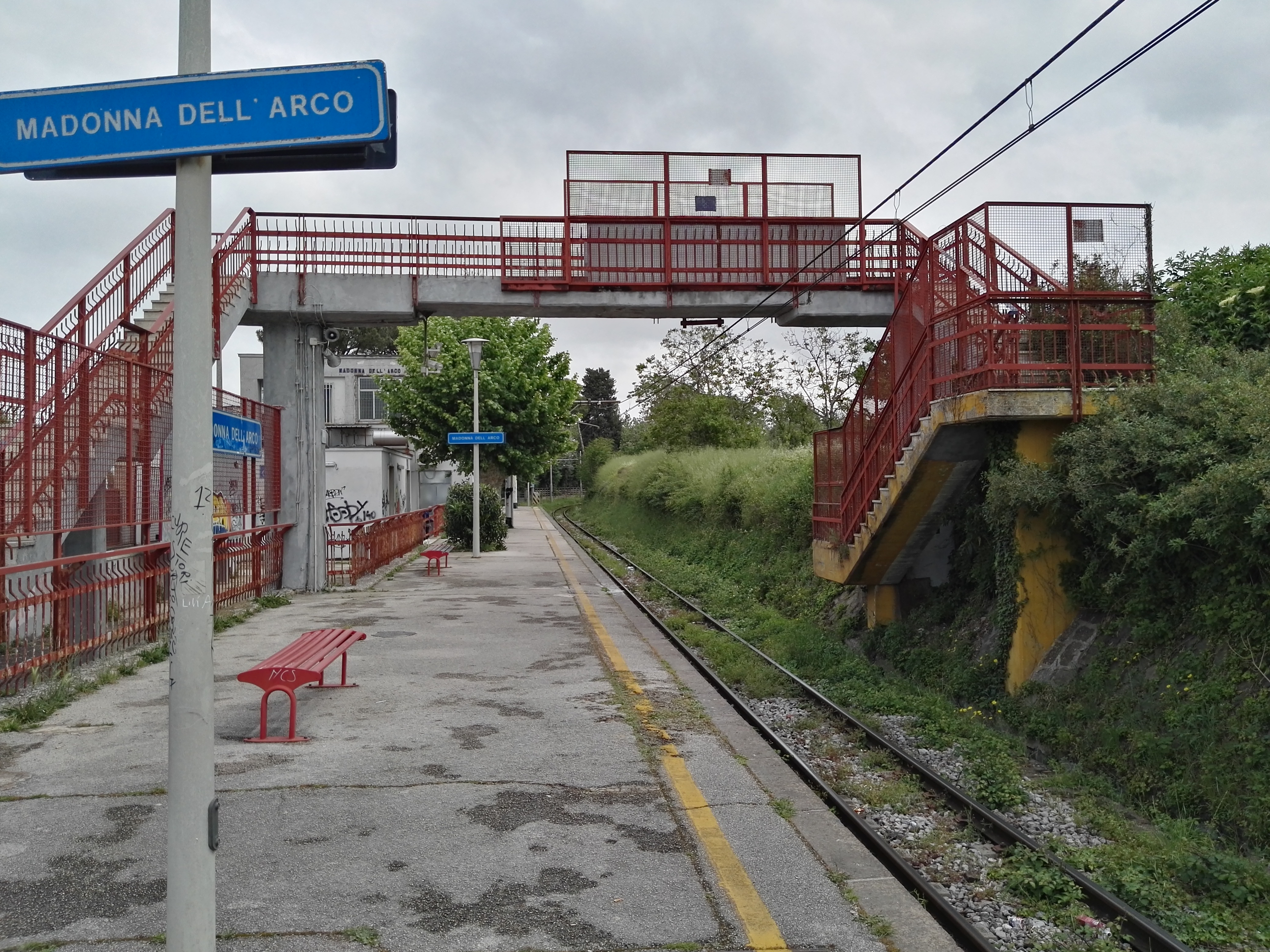 Stazione di Madonna dell'Arco, linea Napoli - Ottaviano - Sarno, Circumvesuviana, EAV - banchina, sovrapasso e binario